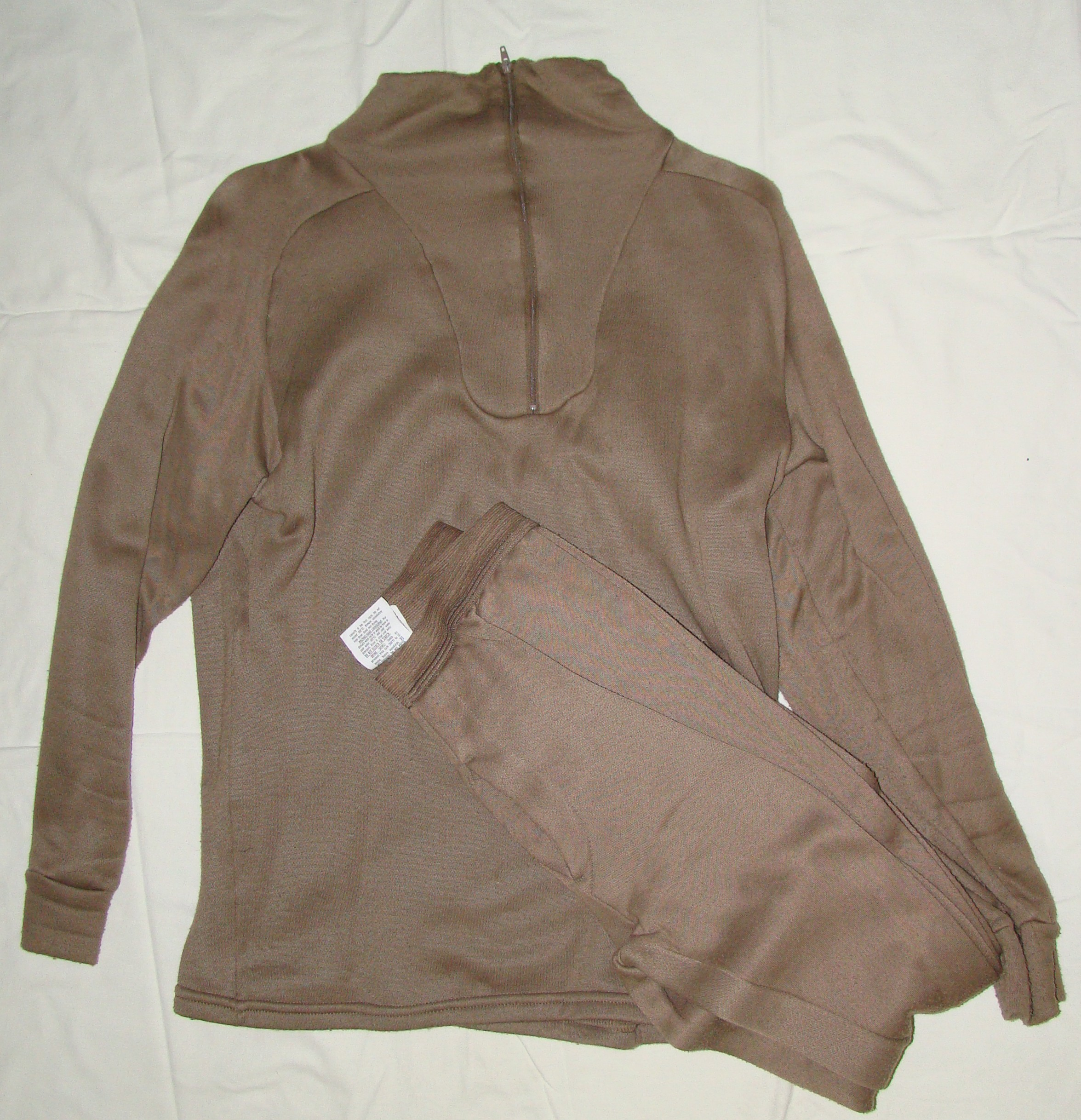 Bielizna Polipropylenowa (warstwa 1) z systemu ECWCS gen. I